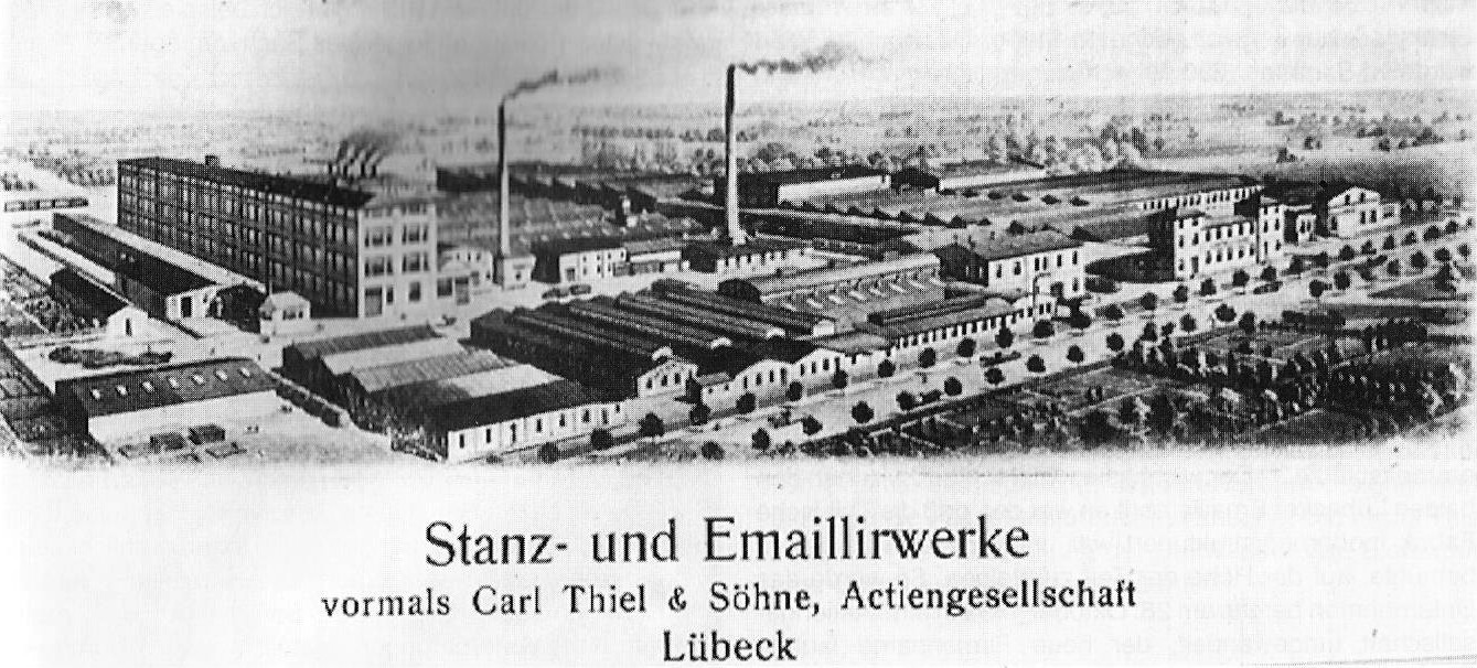 Idealisierte Darstellung der Fabrikanlage Thiel & Söhne um 1920